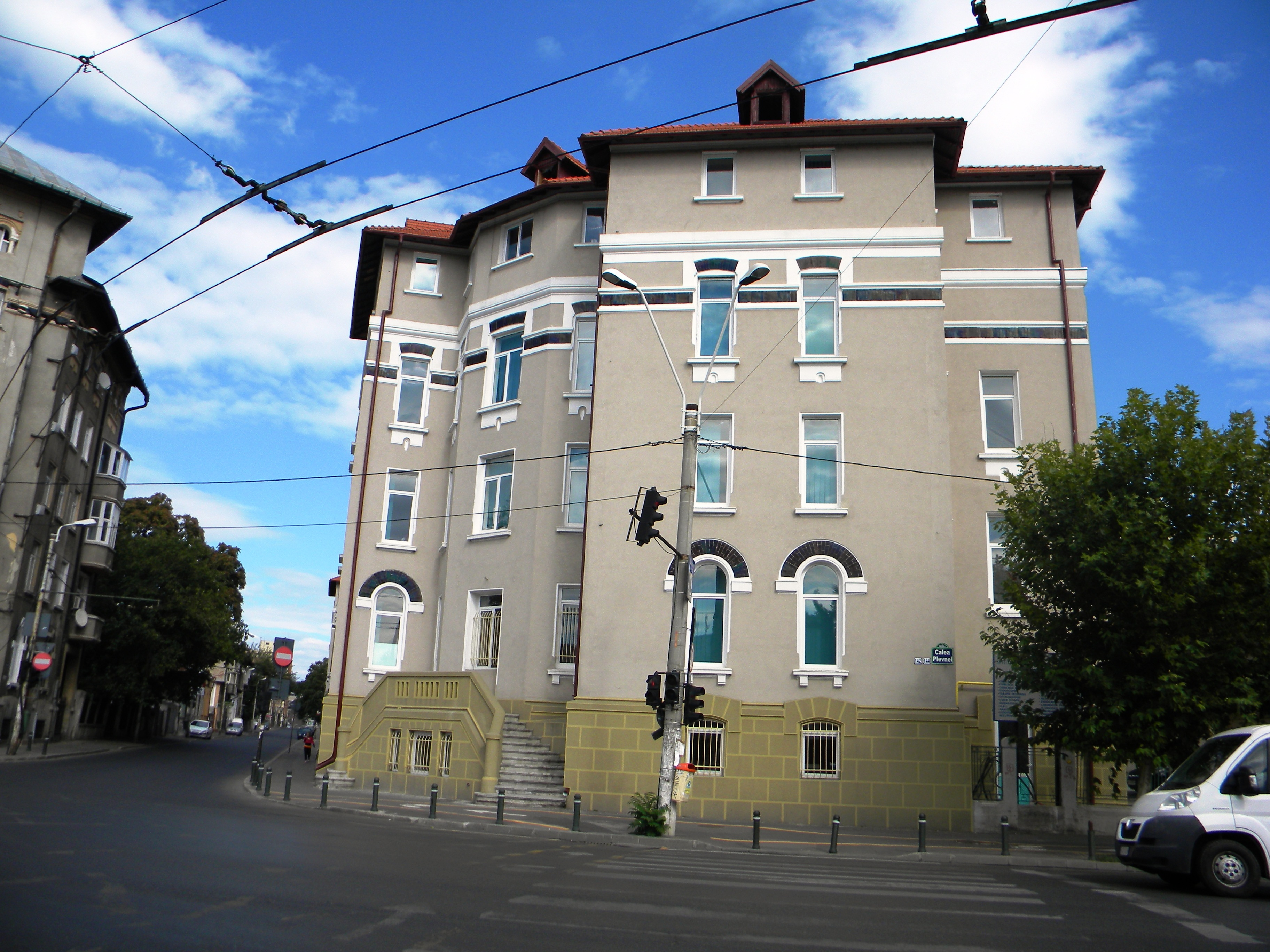 Bucuresti, Romania, Spitalul Witing C.F.R., Calea Plevnei 142-144, sect. 1, (vedere de ansamblu)